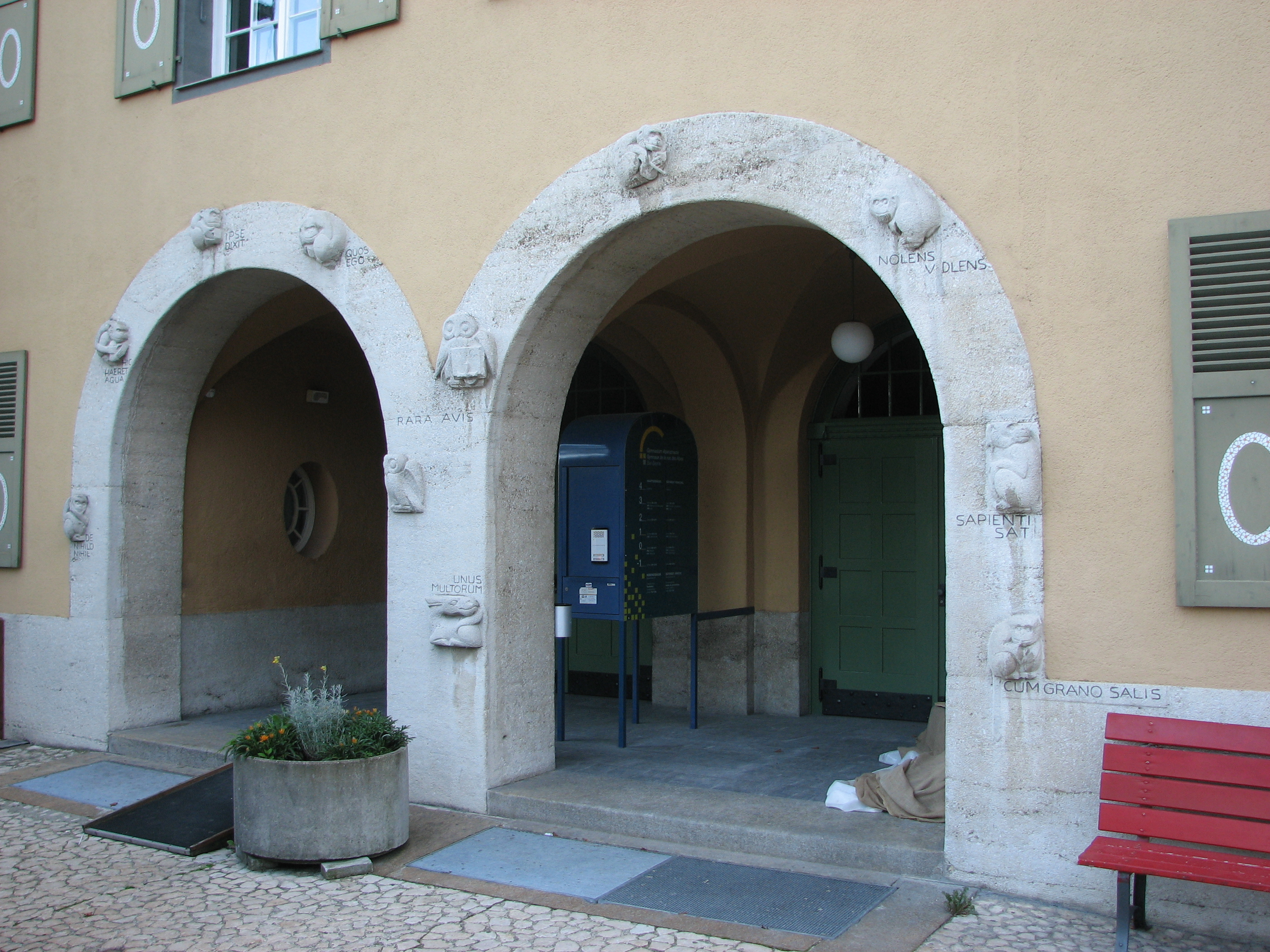 Eingangstor des Gymnasiums Alpenstrasse in Biel/Bienne mit Affenfiguren (Affenkasten)Lateinische Phrasen (von links nach rechts): de nihilo nihil („von nichts kommt nichts“) hic haeret aqua („hier stockt das Wasser“) ipse dixit („er selbst hat es gesagt“) quos ego („euch werd’ ich …“) rara avis („seltener Vogel“) unus multorum („einer der vielen“) nolens volens („unwillig-willig“) sapienti sat („dem Kundigen genug“) cum grano salis („mit einem Gran Salz“)